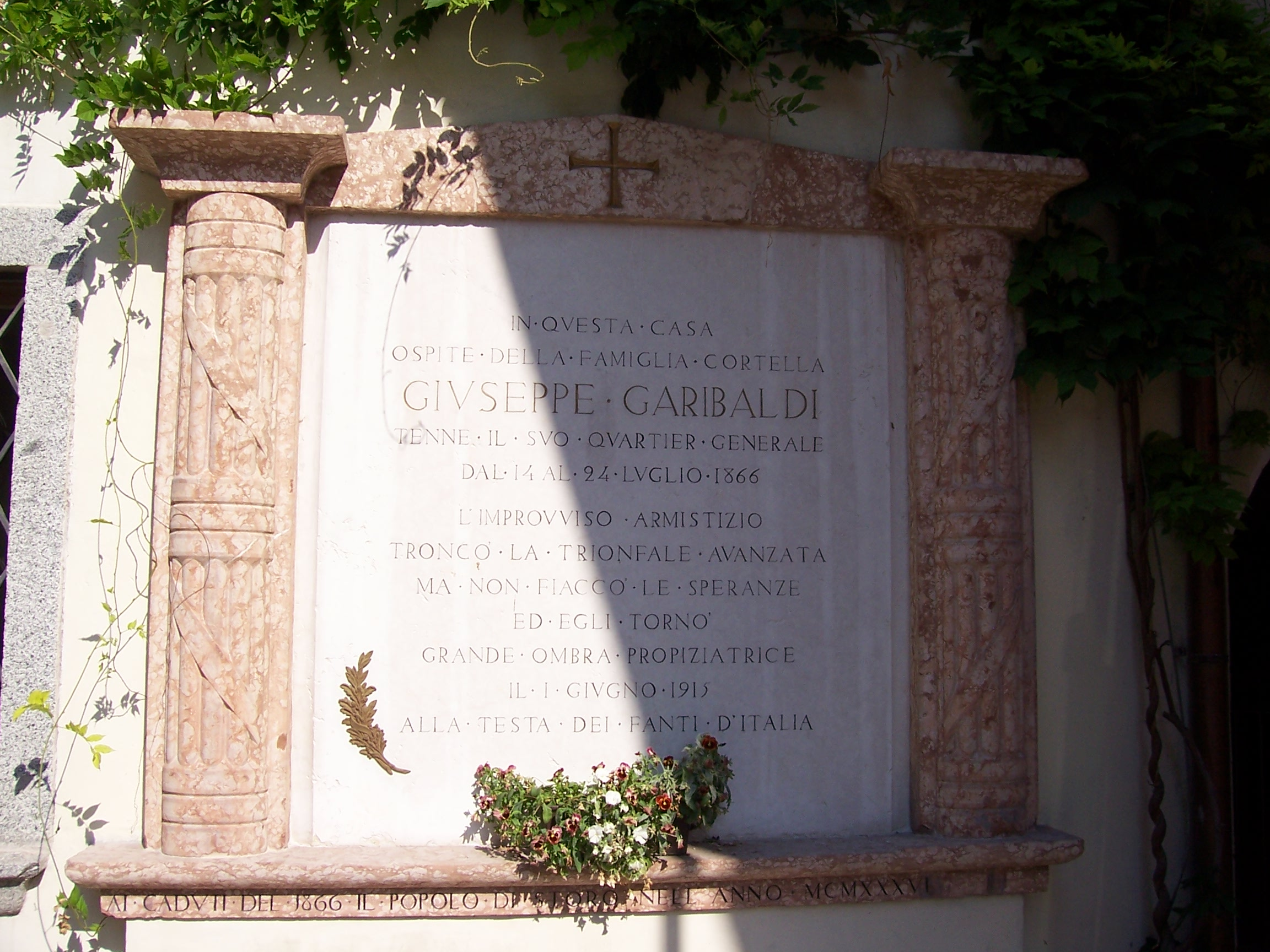 lapide a Giuseppe Garibaldi sita a Storo